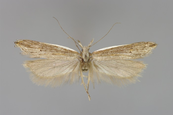 Sophronia semicostella, Männchen